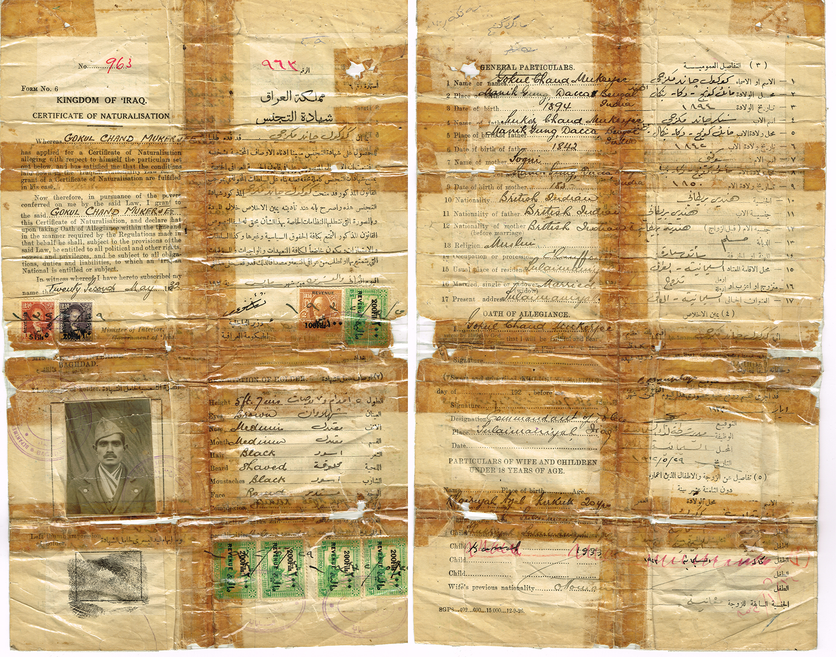 کوردی: بڕوانامەی تەجەنوسی گۆگۆل جاند مکورجی